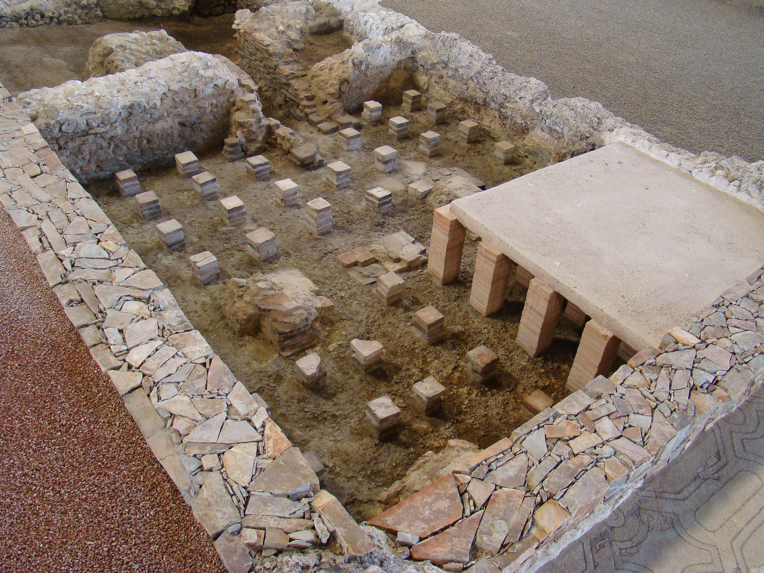 Villa romana de Almenara de Adaja, provincia de Valladolid (España). Recreación in situ del caldario, por donde iba el aire caliente; a la derecha, el suelo.